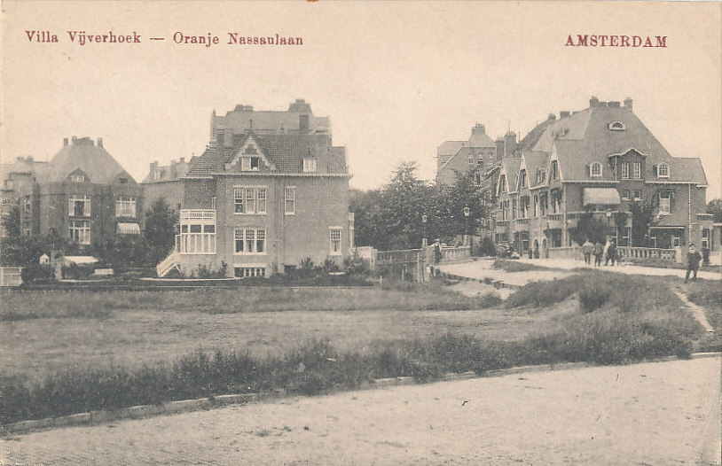 Oranje Nassaulaan - Villa Vijverhoek, Amsterdam (ansichtkaart) met brug 136. Op de voorgrond de plek waar in 1917-'18 de villa op Oranje Nassaulaan 63 is gebouwd.